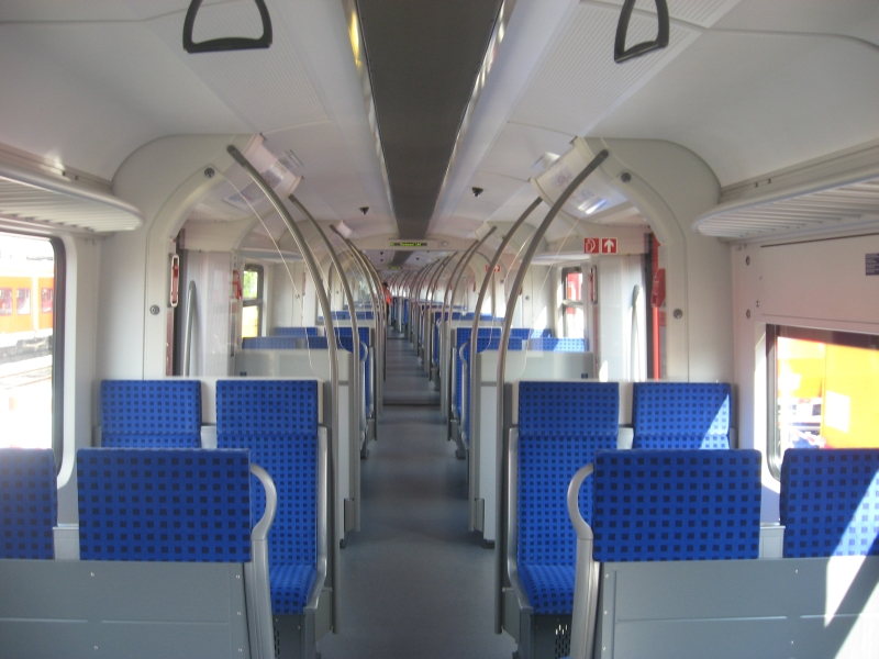 ET422 auf der ExtraSchicht am 21.Juni 2008